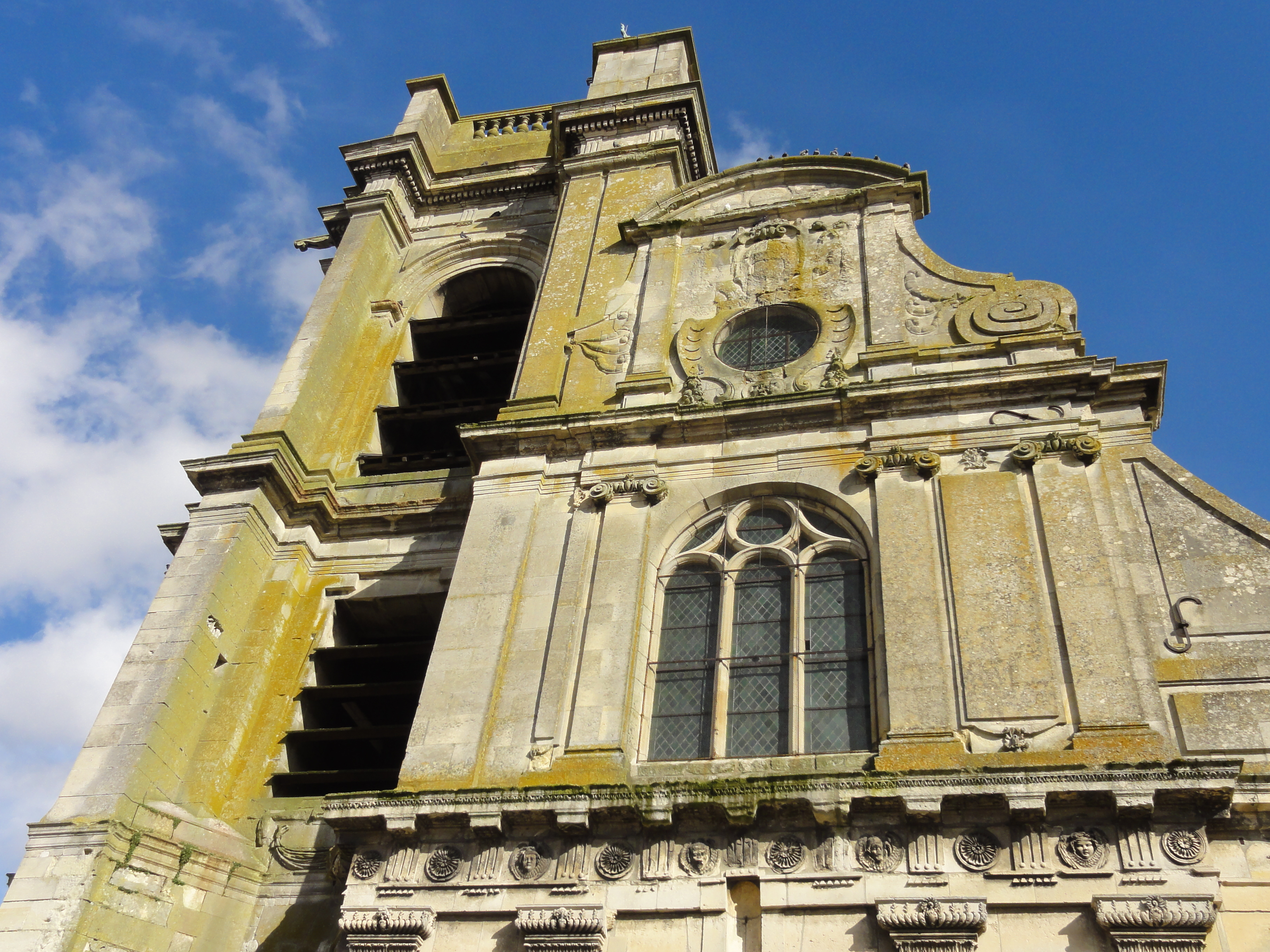 Façade occidentale, régistres supérieurs de style baroque, fin du XVIIe siècle.